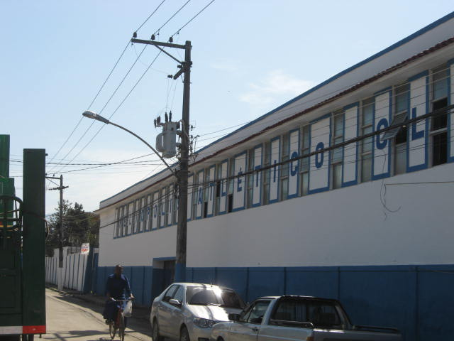 Fachada do Heliópolis Atlético Clube, localizado em Belford Roxo